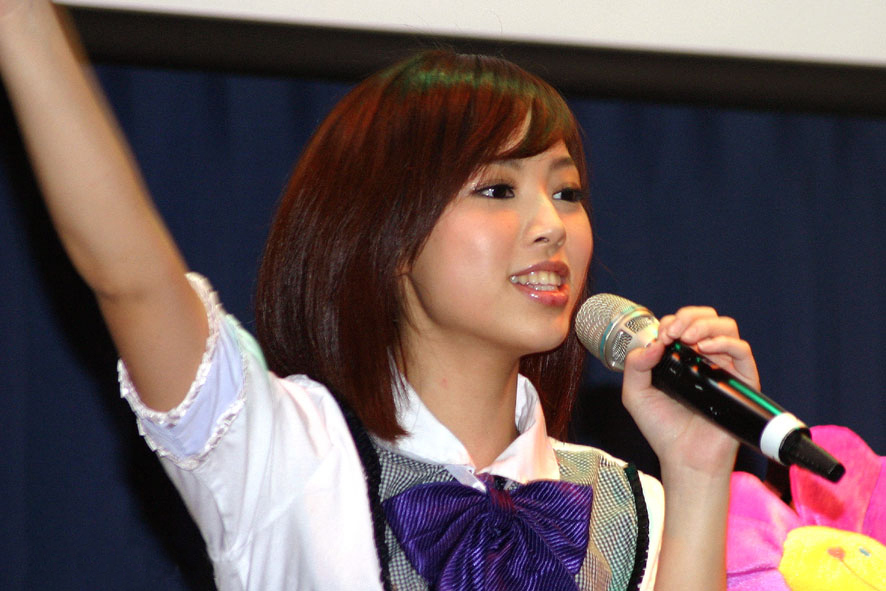 黑Girl允菲(勇兔)在河岸留言西門紅樓展演館"黑澀音樂同樂會in河岸留言"的表演